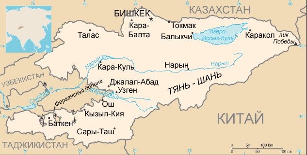 Карта Республики Кыргызстан на русском языке